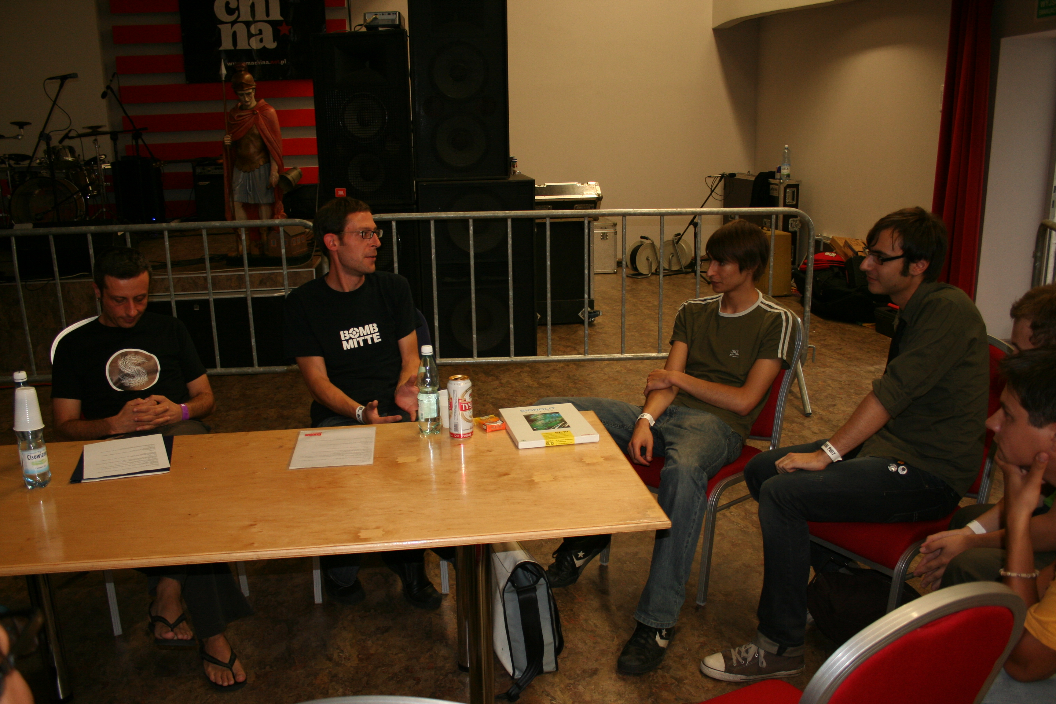 Off Festival, Mysłowice - warsztaty Indie label